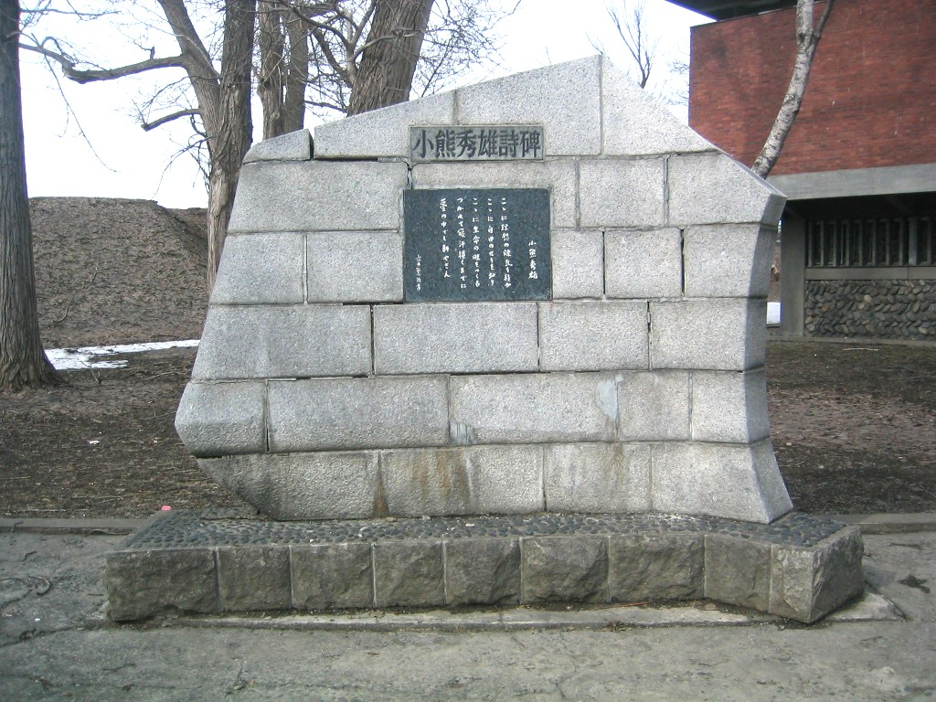 作成者が撮影 撮影年月日：2010年4月17日